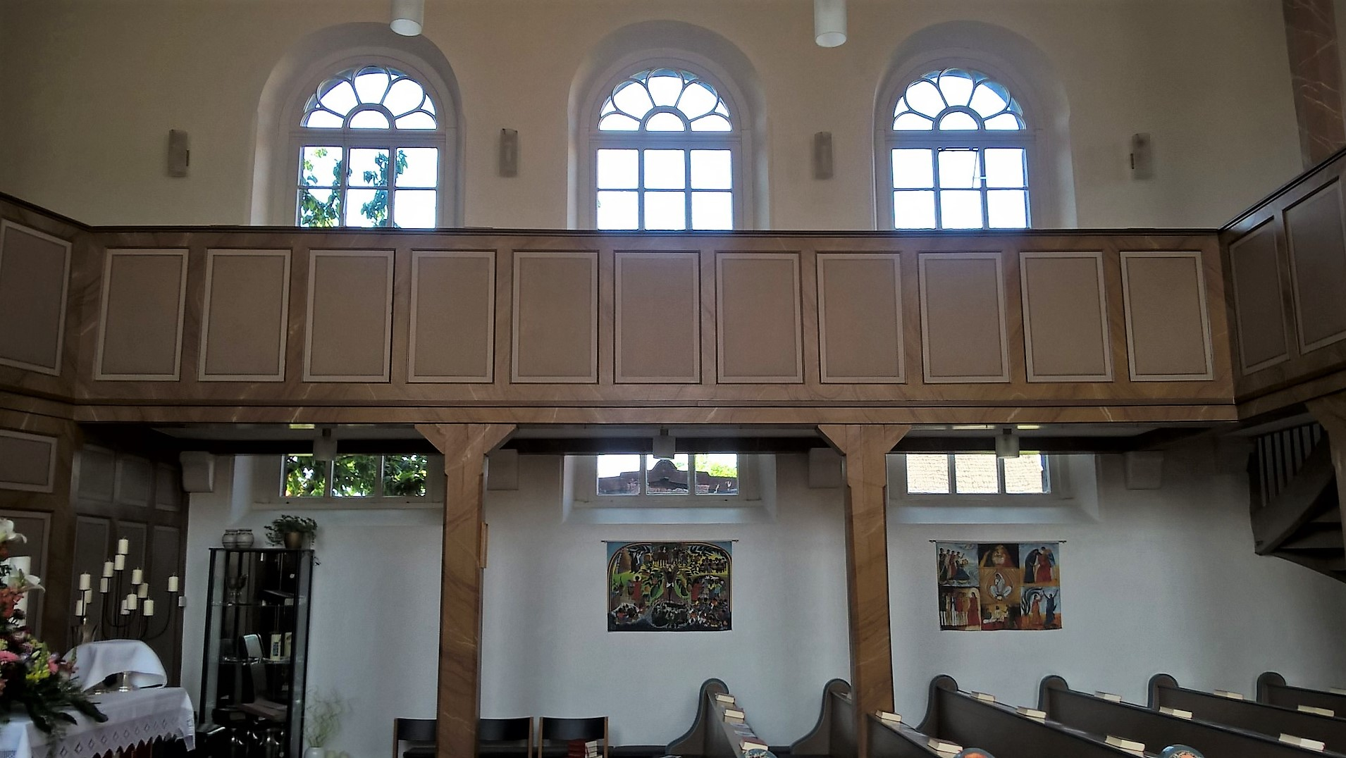 Evangelische Kirche Lumda, Grünberg, Landkreis Gießen, Hessen, Deutschland